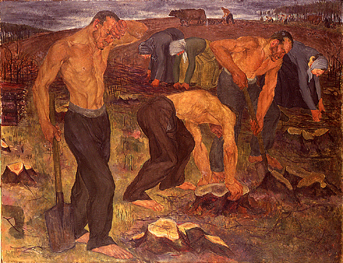 Madeleine Lavanture, Tu gagneras ton pain à la sueur de ton front, 1938, Paris, ENSBA